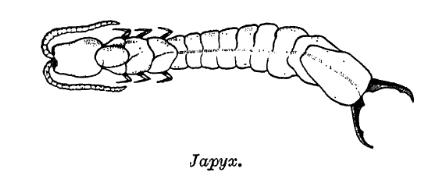 Japyx, Japygidae